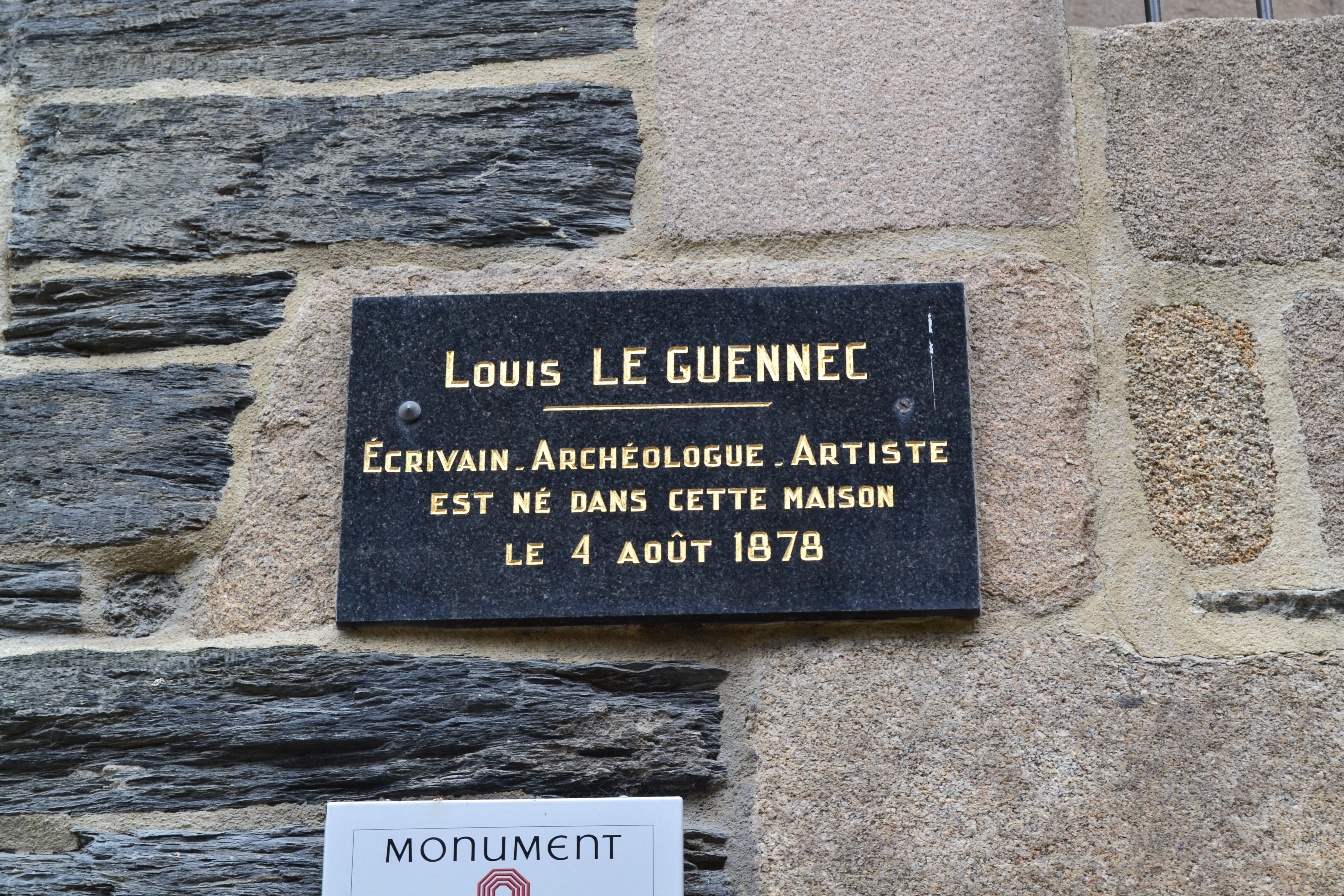 Plaque indiquant la naissance de l'écrivain Louis Le Guennec (le 4 août 1878) sur l'Hôtel de François du Parc à Morlaix.